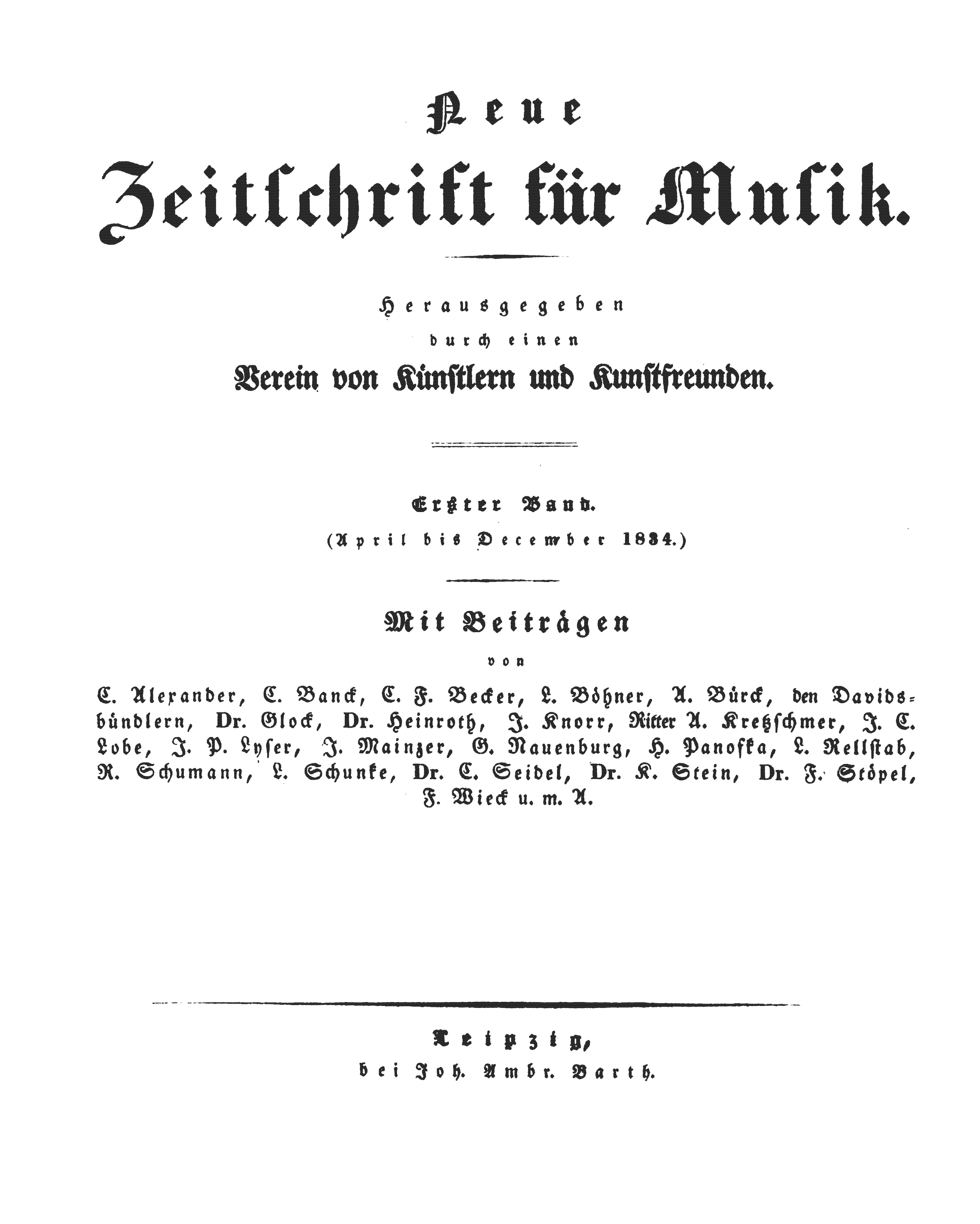 Titelseite der Zeitschrift / Title page of the periodical.